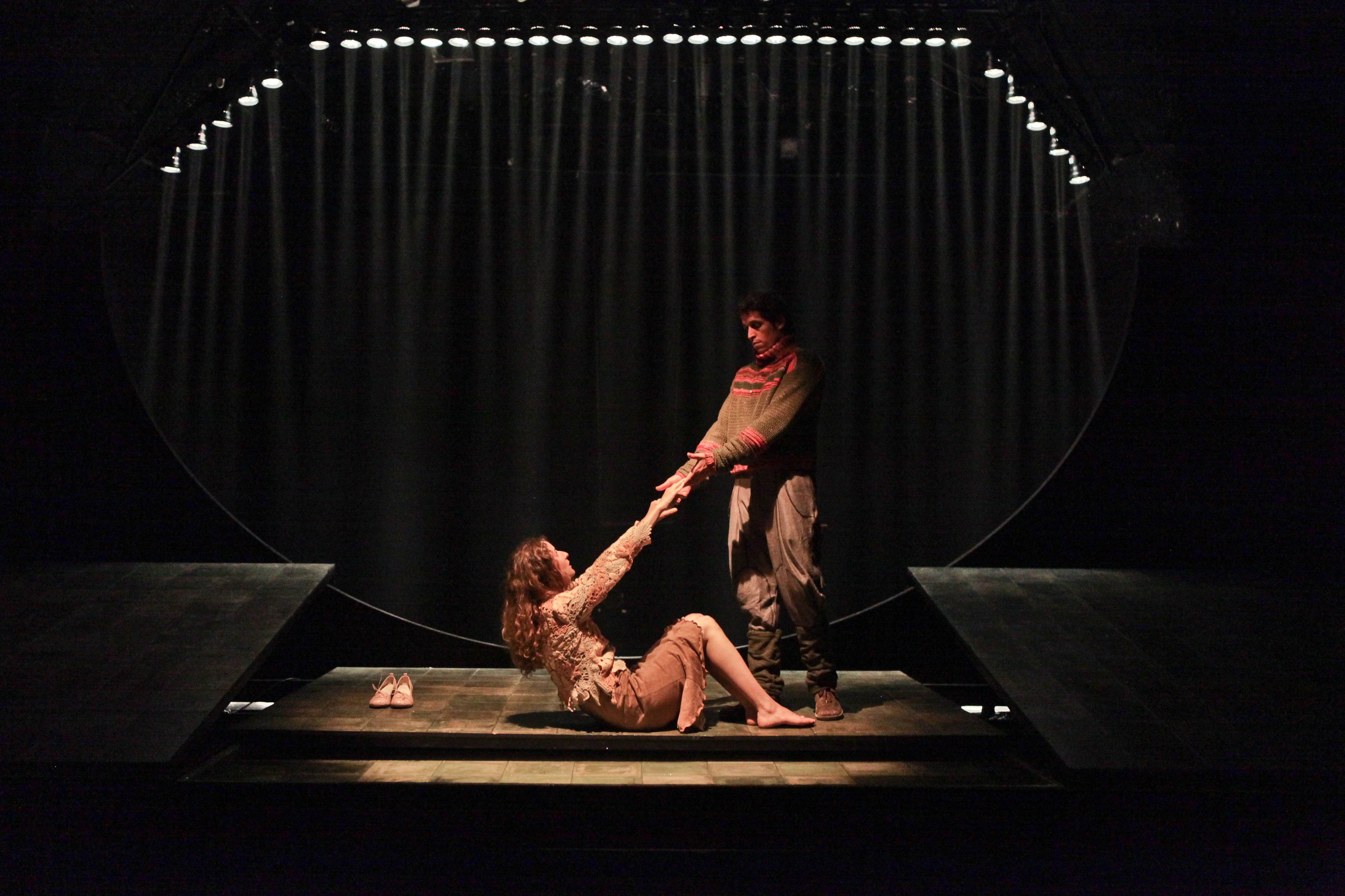 יואב היימן ואורית גל ב"מולי סוויני", תיאטרון החאן